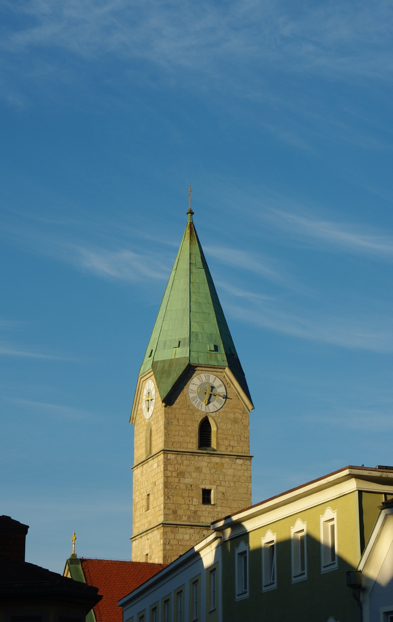 Poststr. 18, 83435 Bad Reichenhall, Kath. Kirche St. Ägidien, Kirchturm im Abendlicht über den Dächern der StadtThis is a photograph of an architectural monument.